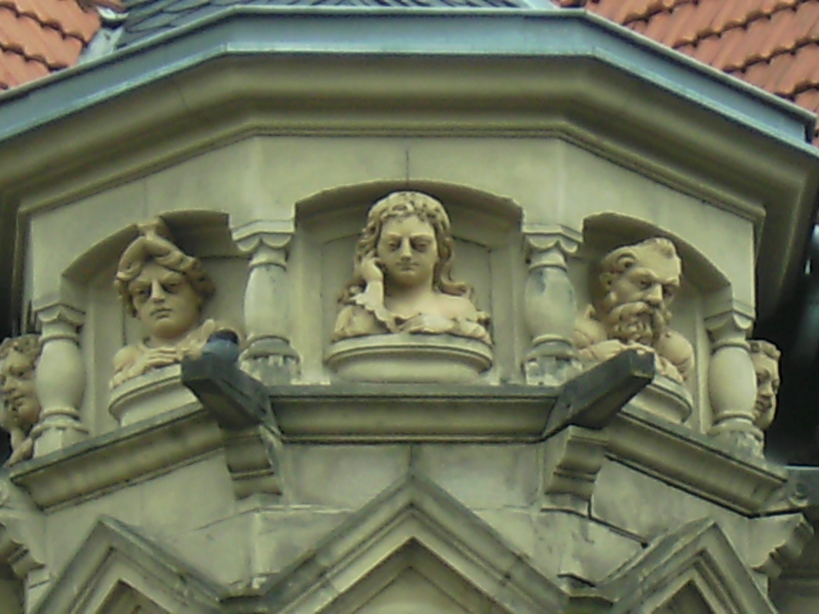 Saarbrücken: Sandsteinverzierungen Ende 19. Jahrhundert(Mainzer Strasse)